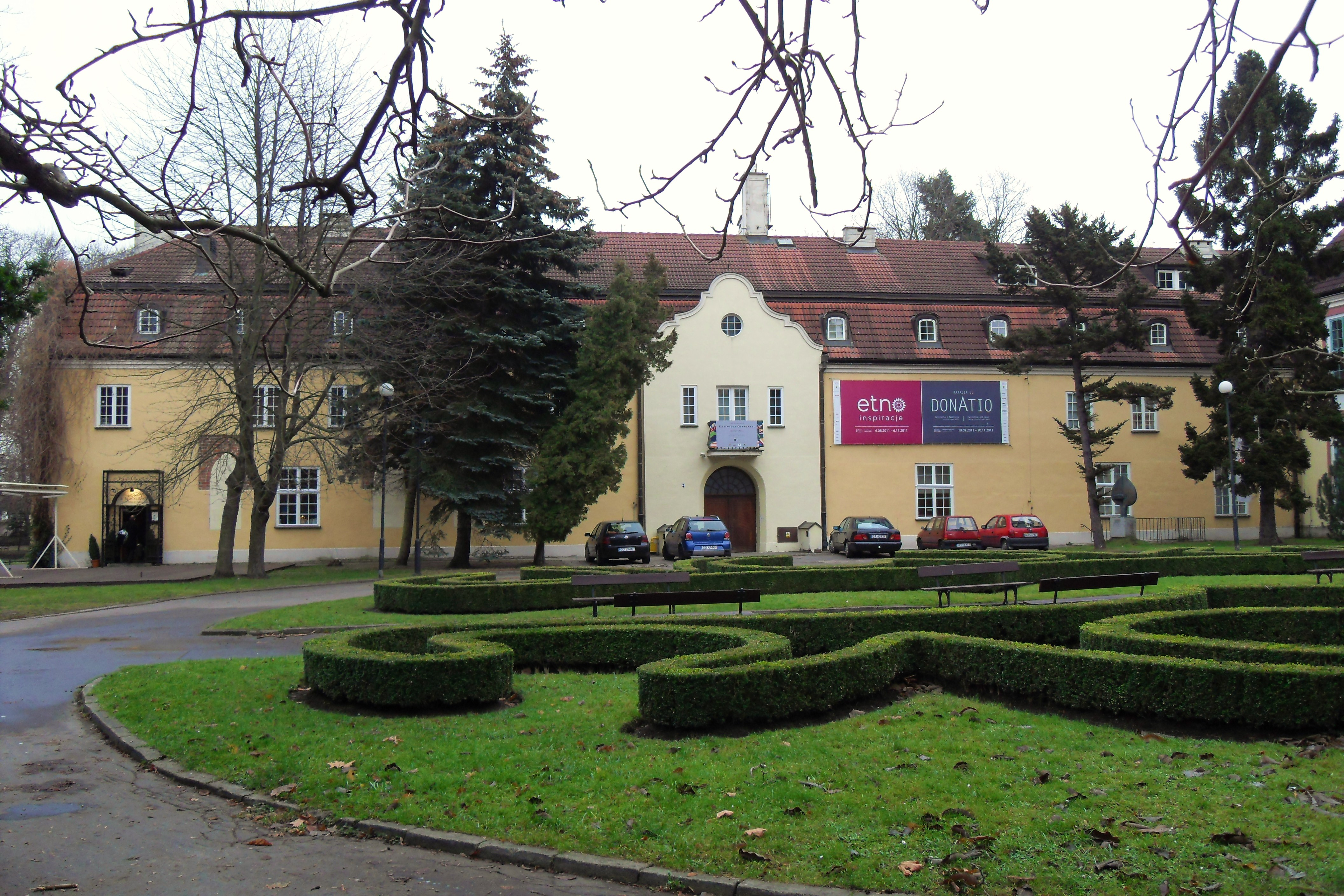 Gdańsk Oliwa. Park Oliwski, stary pałac opacki.